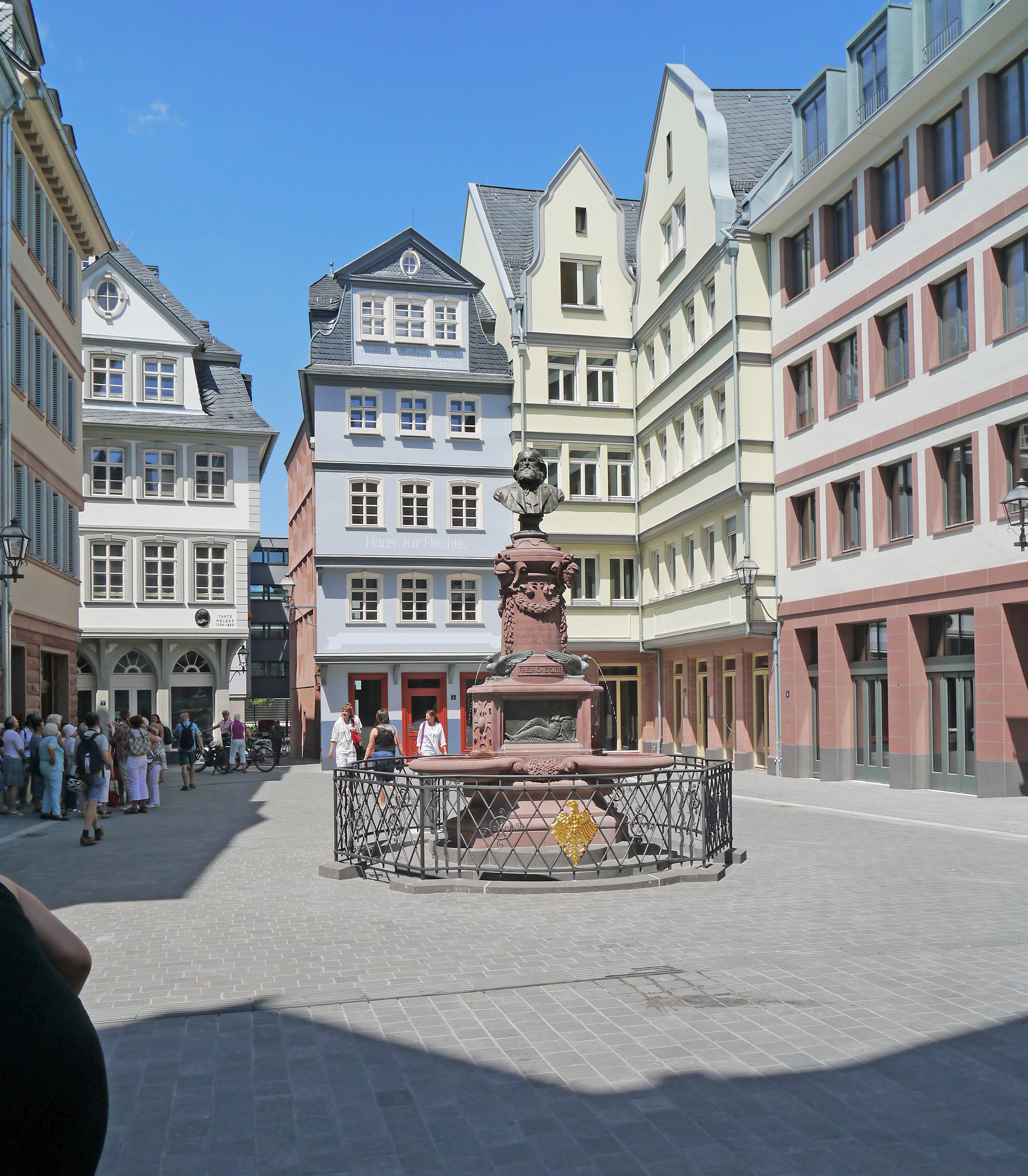 Blick vom Markt auf den Hühnermarkt mit dem Stoltze-Brunnen (20.06.2018). Hinten links: das Haus Esslinger, dann die Neugasse und rechts davon das Haus Zur Flechte.